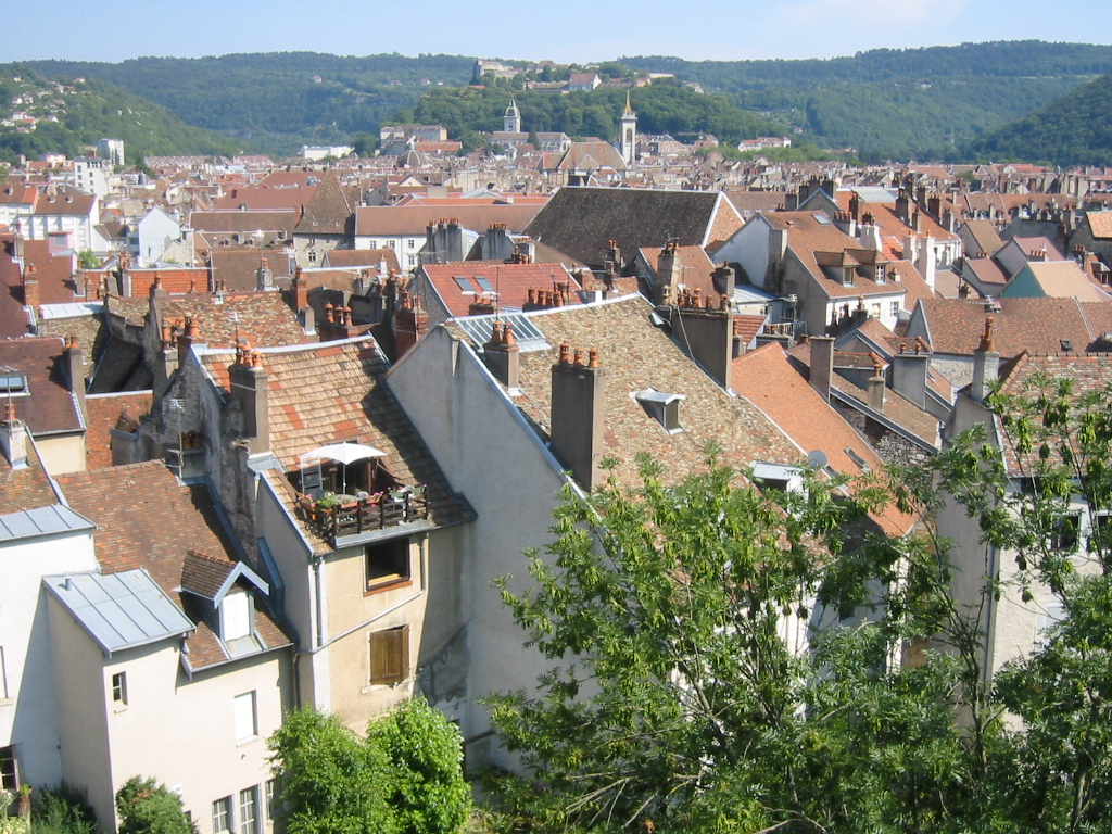 Panoramique de Besançon et de la Citadelle de Besançon